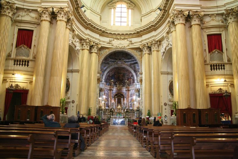 The interior of the Santuario della Madonna di San Luca (Bologna)